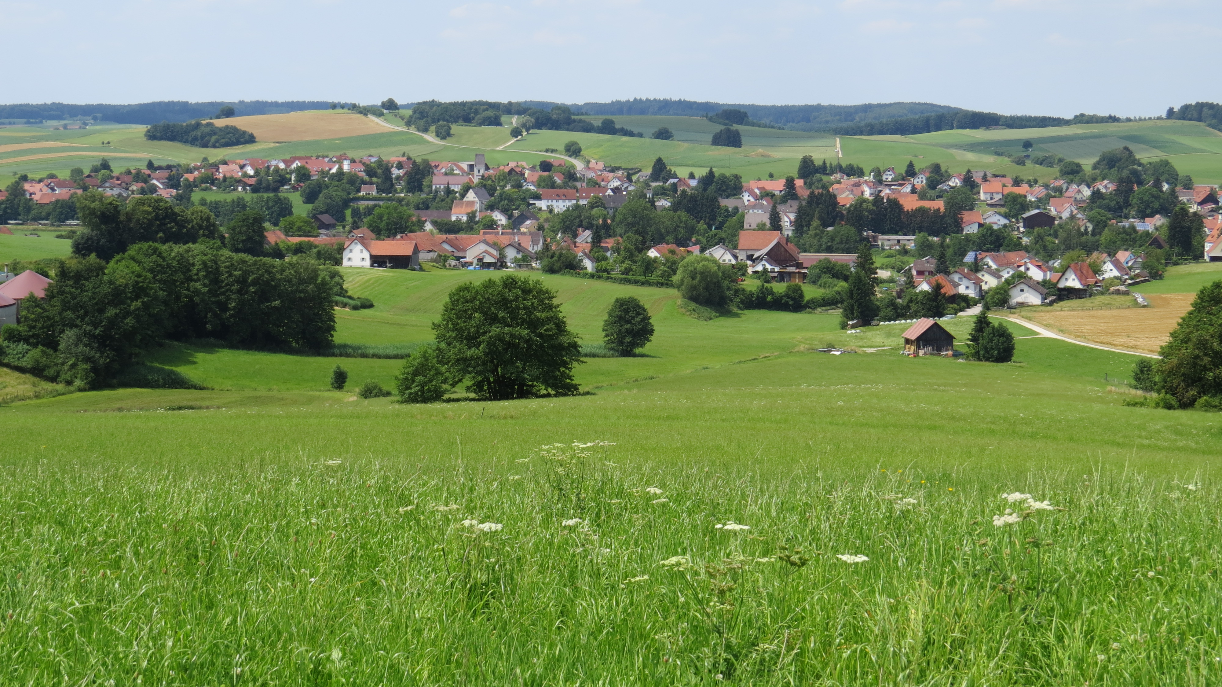 Mittelneufnach von Nordosten